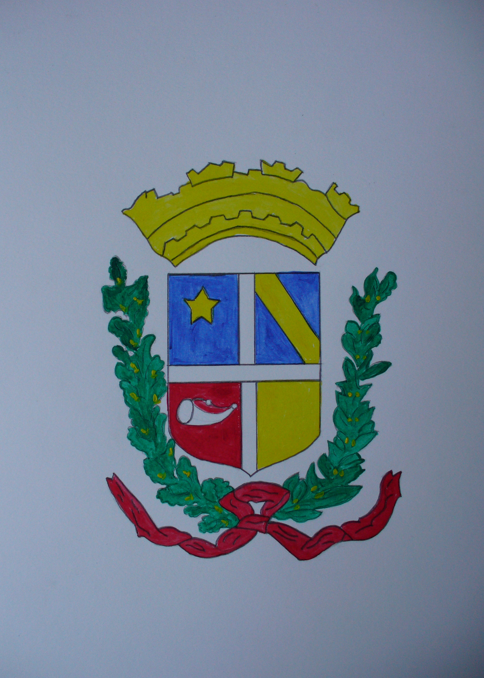 Blason de la commune de Jasney d'après les couleurs décrites par Nicolas Vernot.